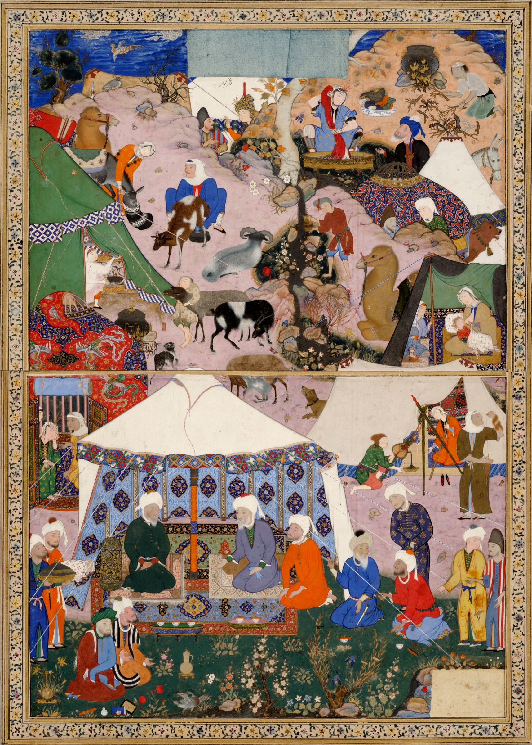 Мир Сеид Али Хамсе Низами. 1540 Британский музей